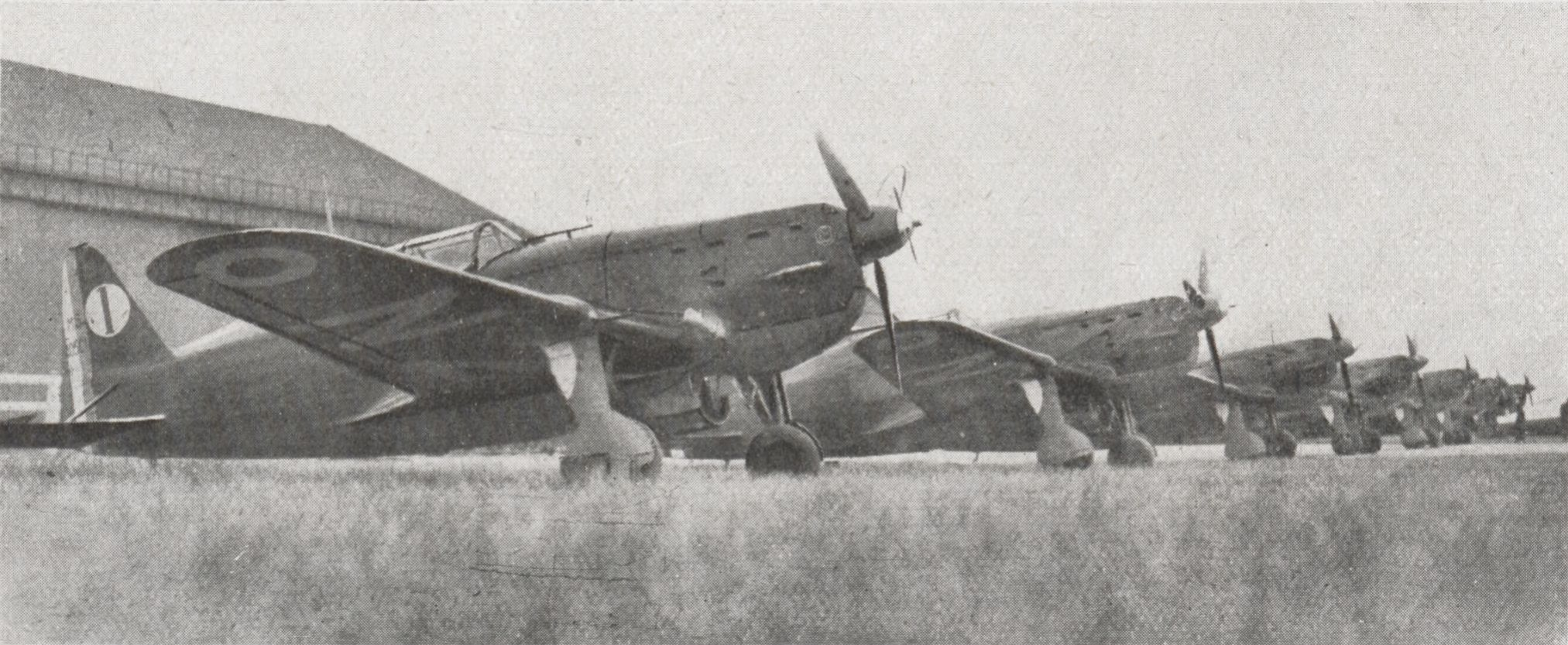 Groupe de MORANE-SAULNIER 405 rassemblés à Villacoublay pour la Fête de l'Air 1938.